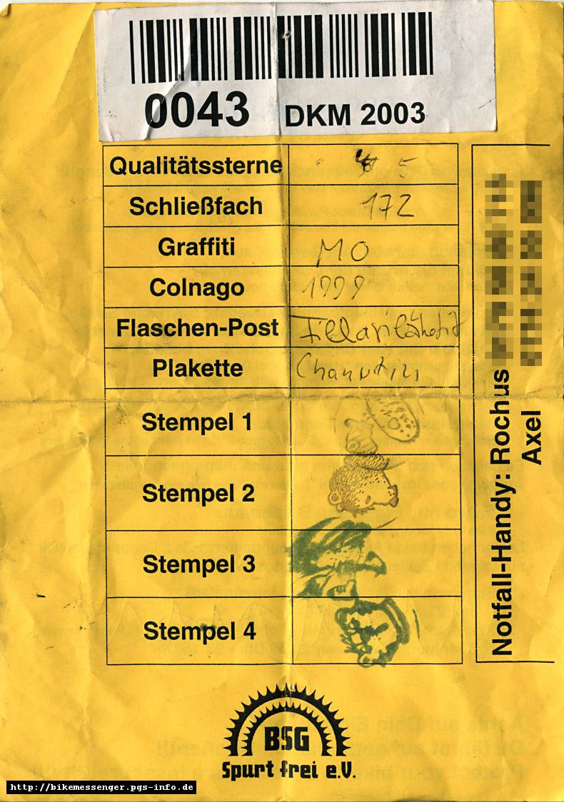 Manifest der Deutschen Kuriermeisterschaft DKM 2003 in Dresden. Personenbezogene Angaben auf dem Manifest wurden anonymisiert